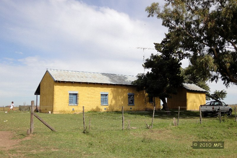 Estación González Risos del ex FFCC Midland